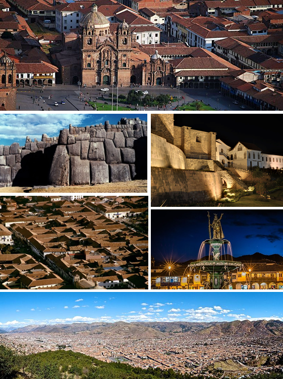 Cusco, Perú